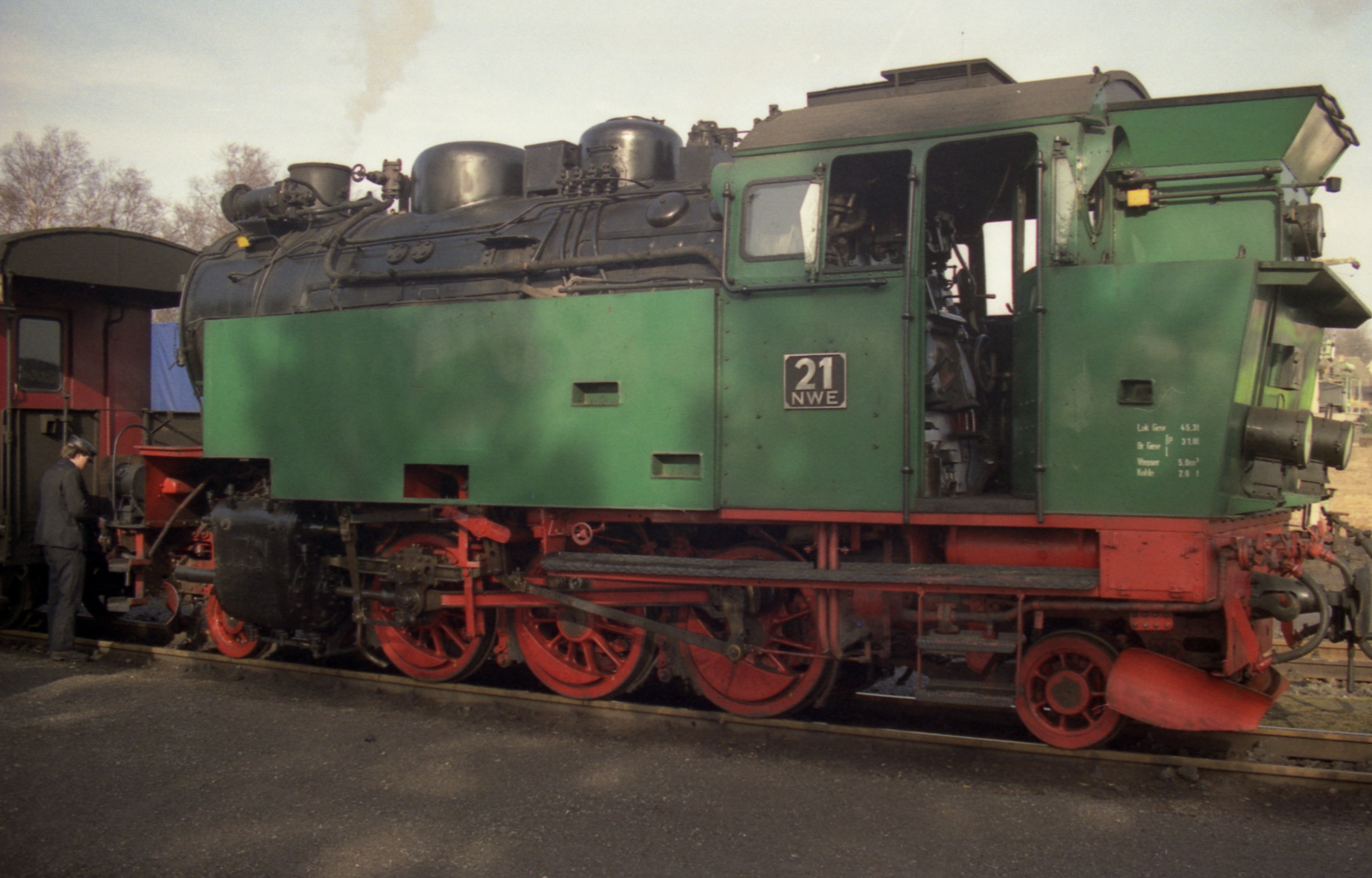 Dampflok 99 6001, Bauj. 1939, Von 1991 bis 1994 in Grün, Spitzname Laubfrosch